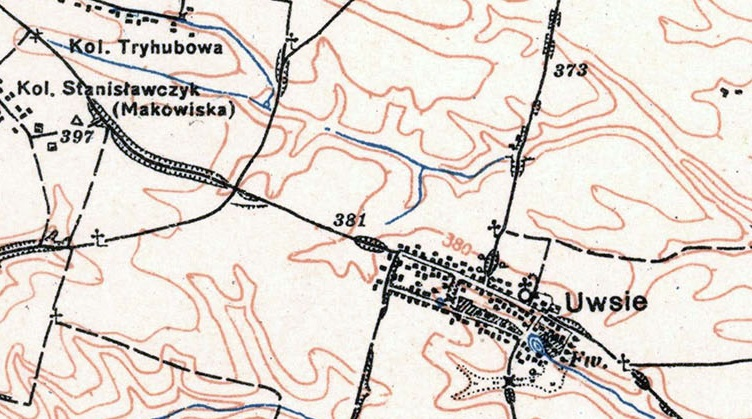 Вівся, Маковисько, колонія Тригубів на мапі Польської Республіки (1918-1939)